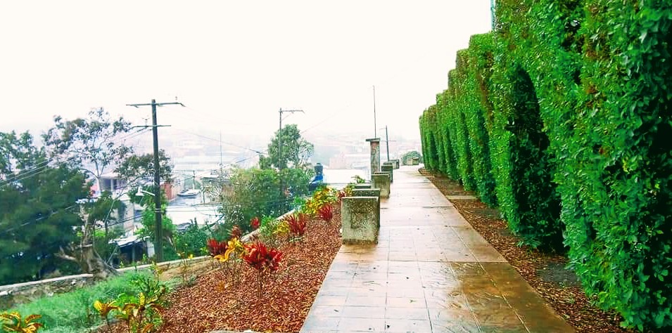 Andador en la entrada principal de San Fernando